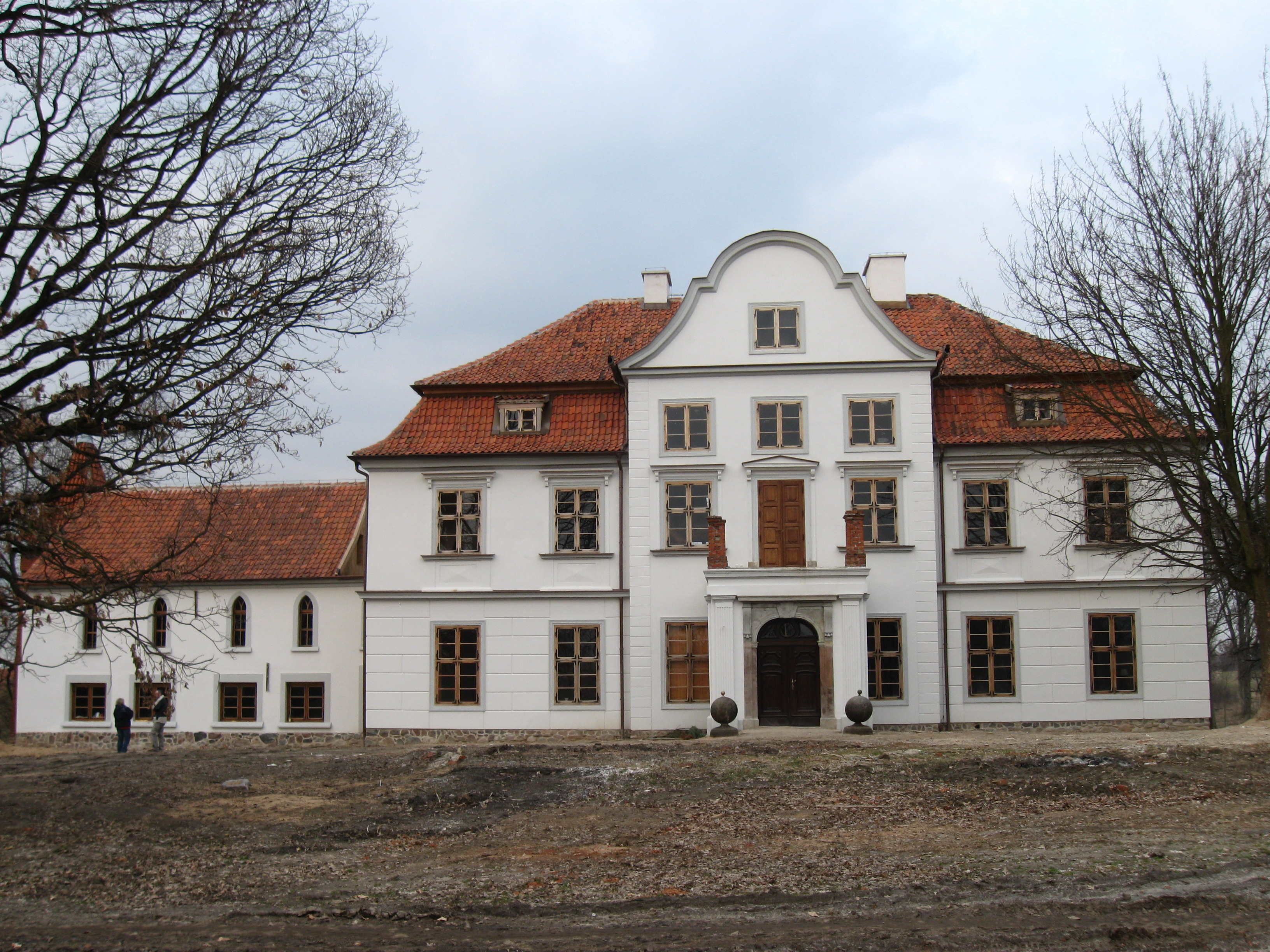 pałac Bogatyńskie